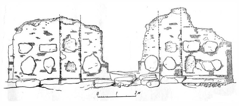 Прарысоўка сцен заходняга фасада Ніжняй царквы ў Гродне